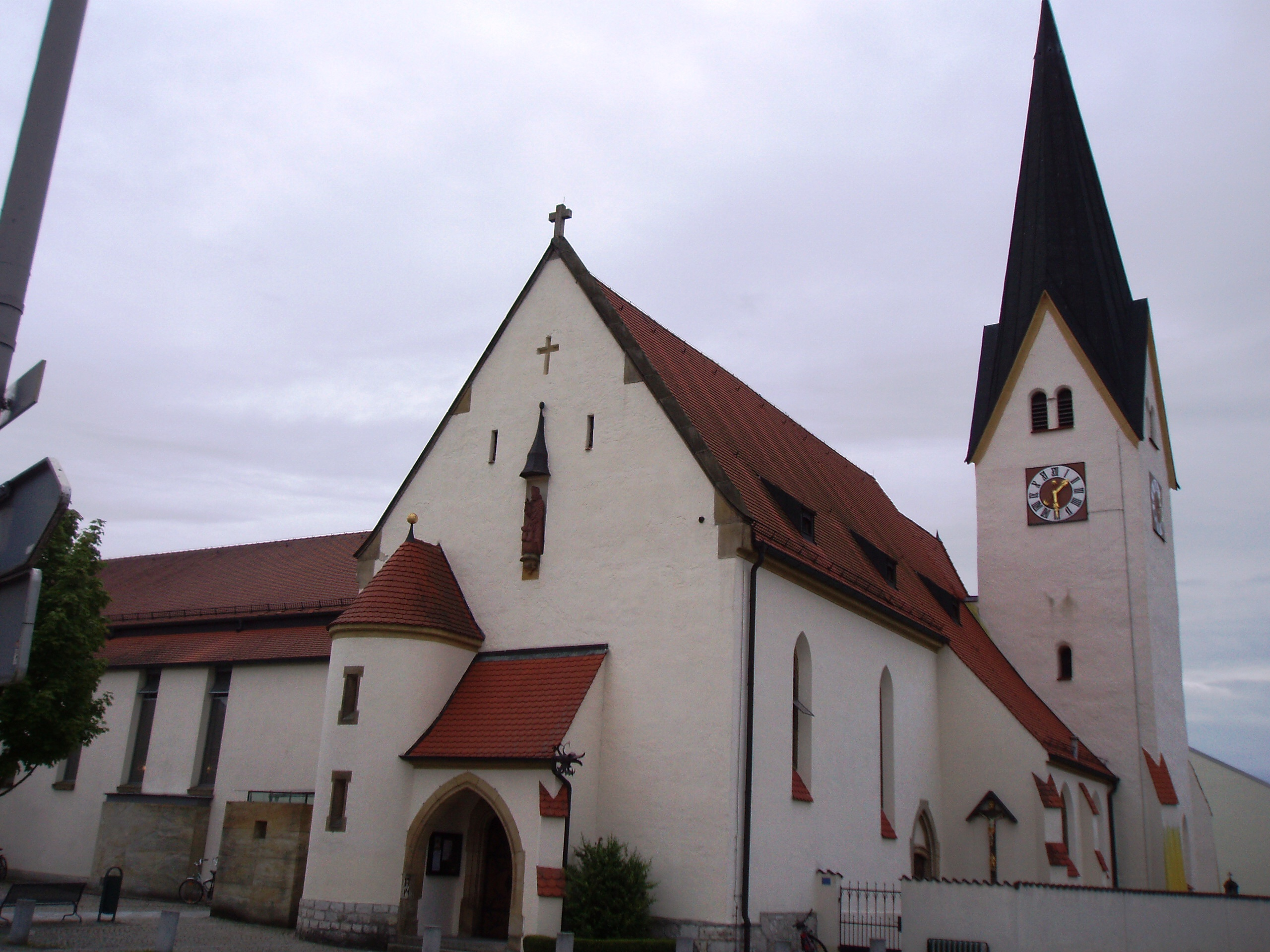 Mindelstetten, Landkreis Eichstätt, Pfarrkirche St. Nikolaus mit Erweiterungsbau